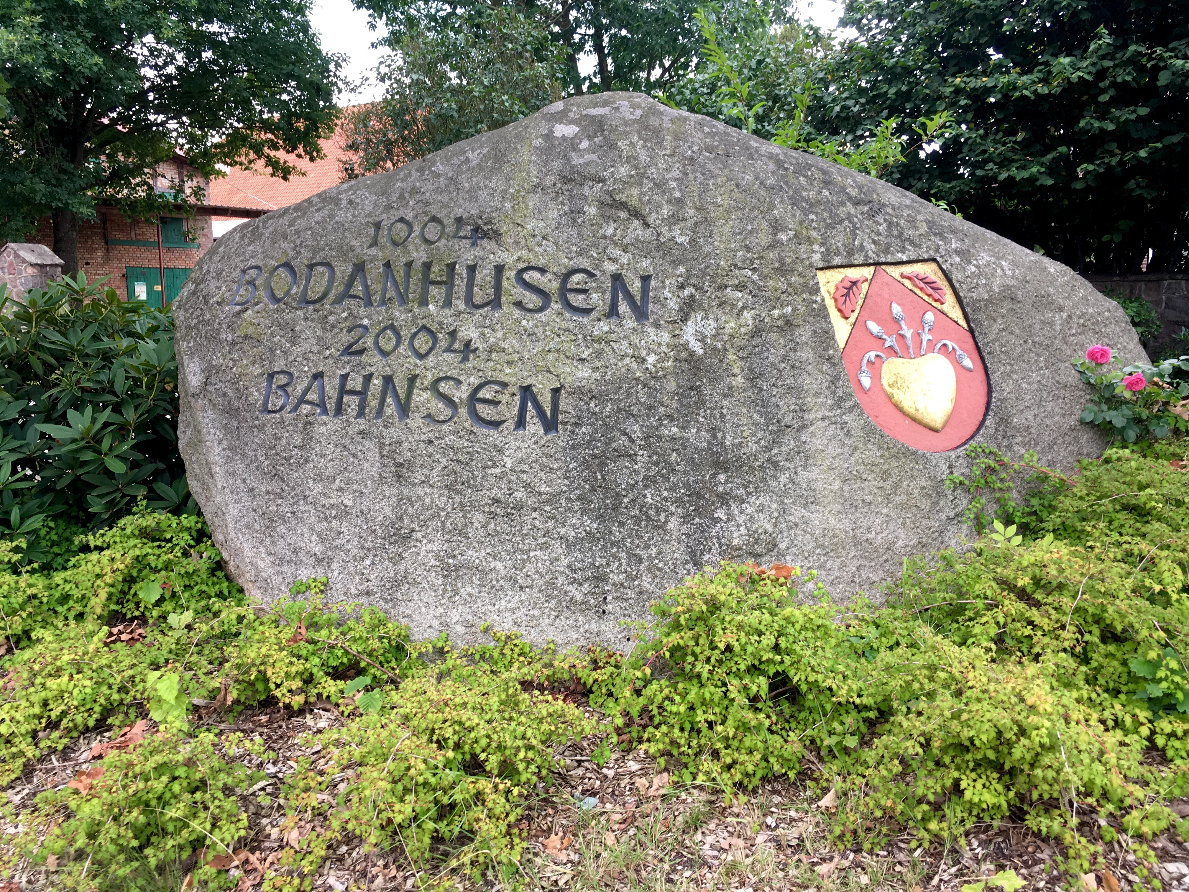 Findling in Bahnsen, Kreis Uelzen